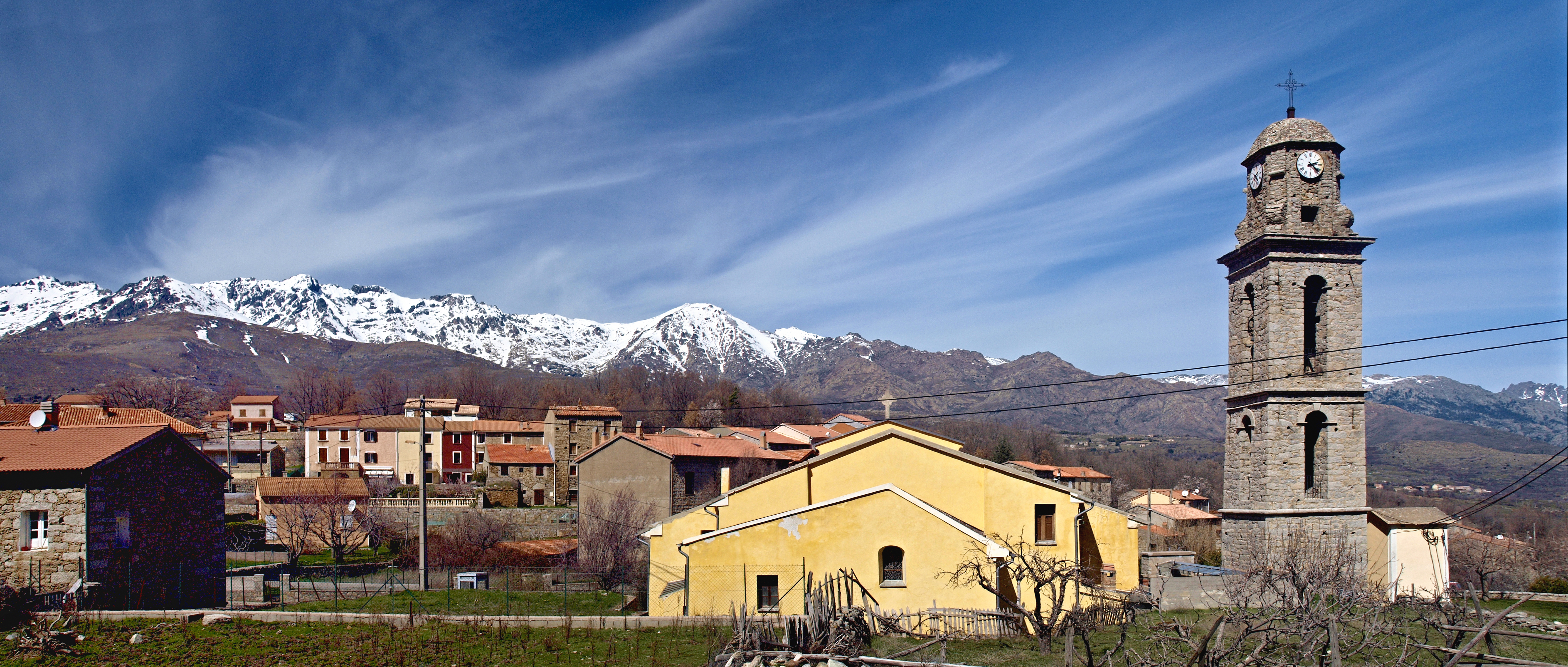 Casamaccioli (Corsica - L'église de la Nativité sur fond de Monte Cinto